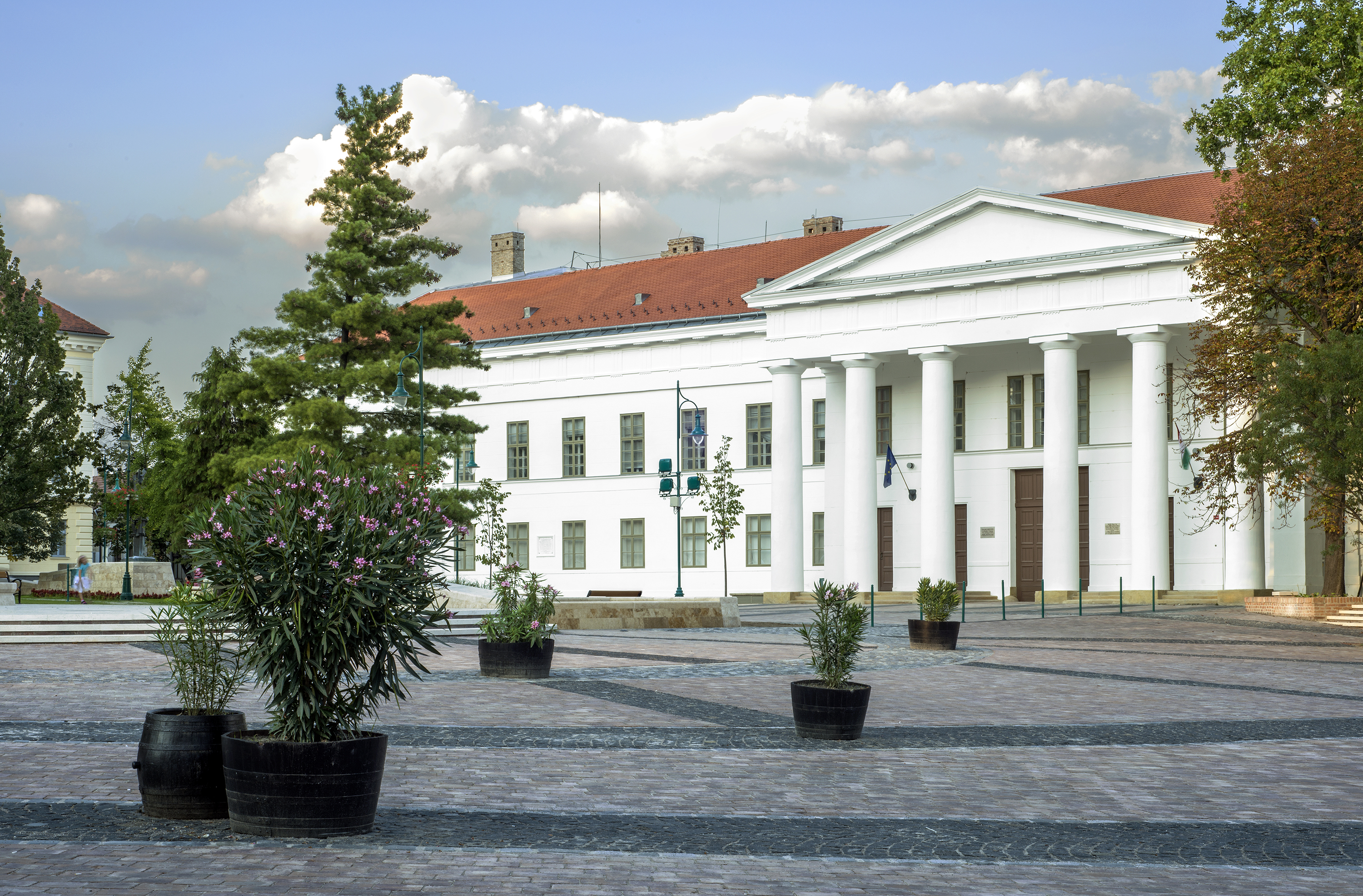 régi megyeháza This is a photo of a monument in Hungary. Identifier: 8743